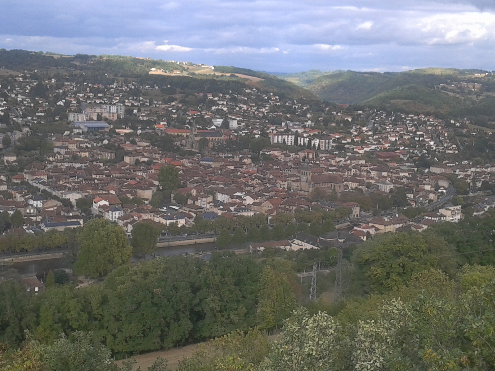 Vue sur Figeac depuis le Cingle-Haut